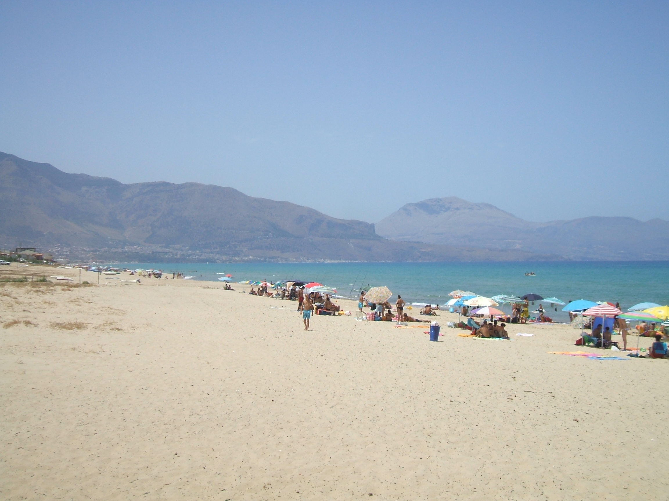 trapani_alcamo marina_2